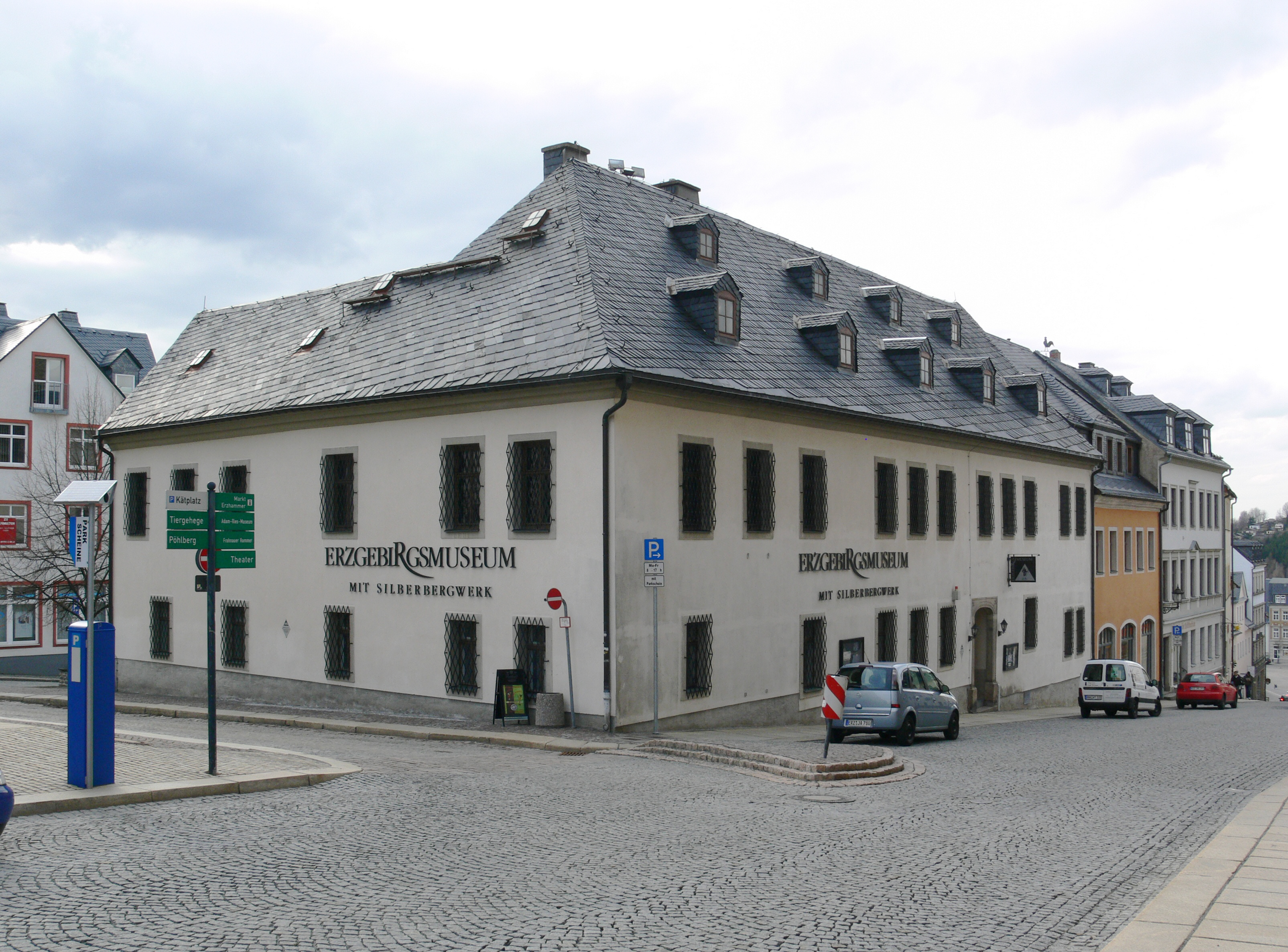 Annaber, Erzgebirgsmuseum